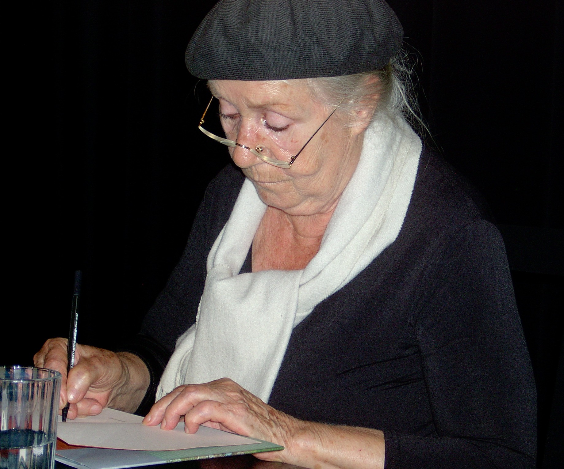 Die Schauspielerin Käthe Reichel signiert nach einer Buchlesung im Berliner Ensemble. Buchvorstellung: „Windbriefe an den Herrn b.b“